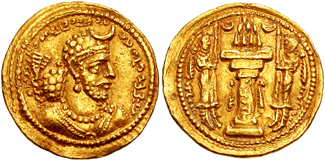 Dinar do xá Izdegerdes I